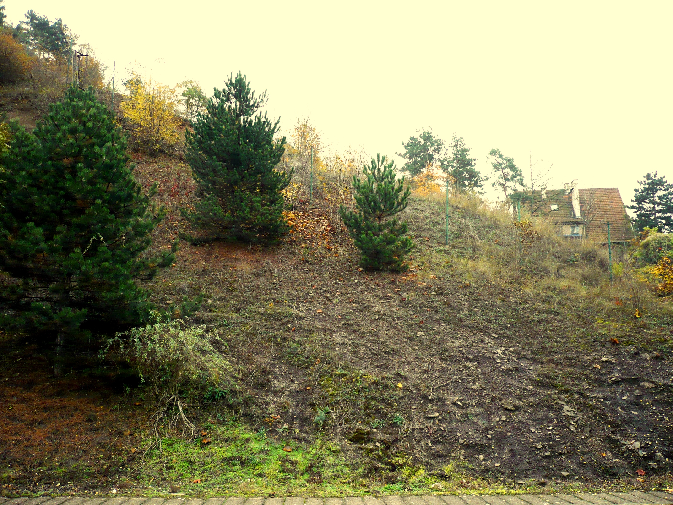 Svah nevytěžené části lomu